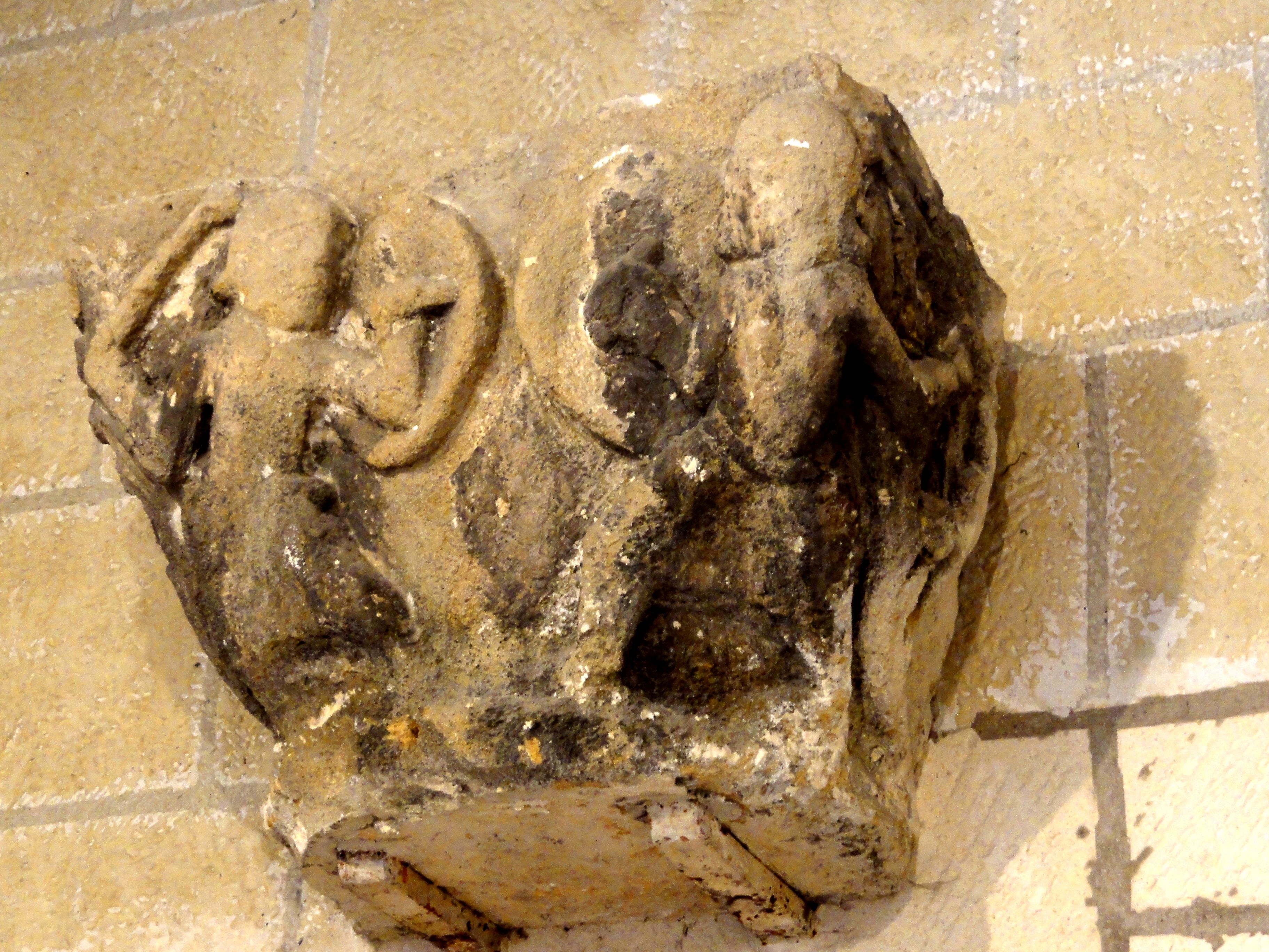 Musée Tavet-Delacour, chapiteau roman provenant de l'église d'Osny.